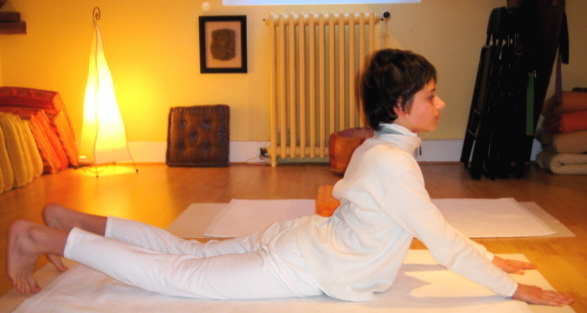 Yoga postures Bhujangasana